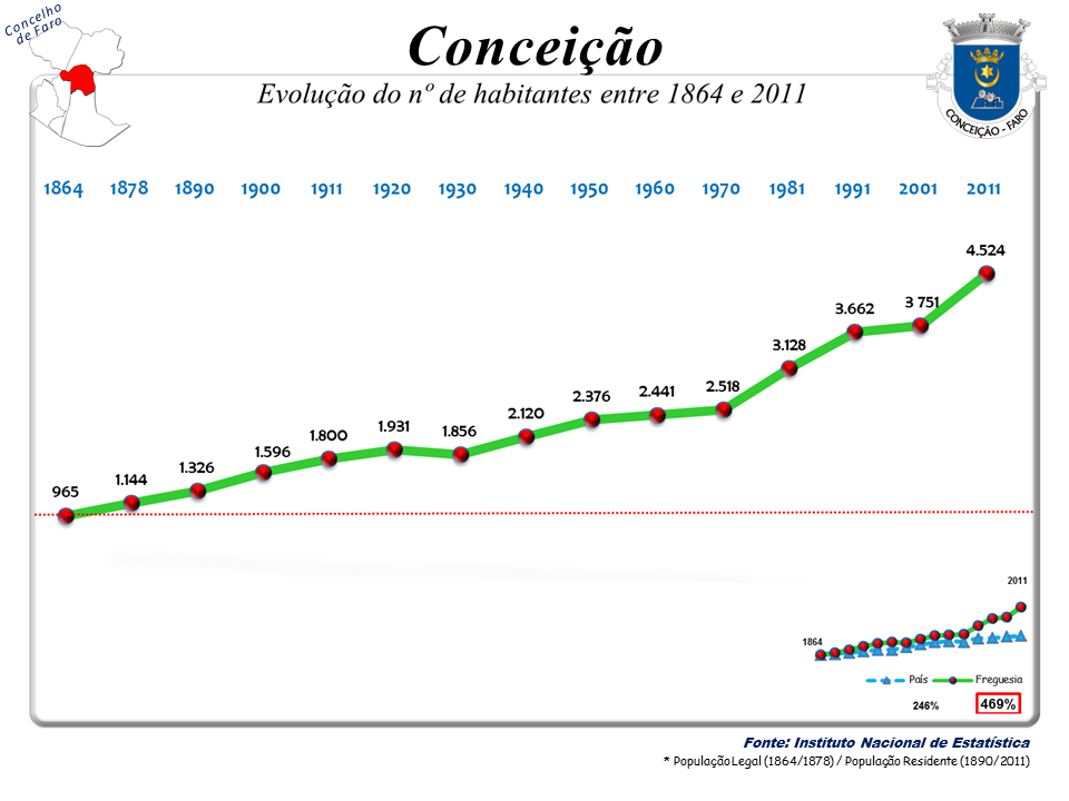 Censos 1864/2011